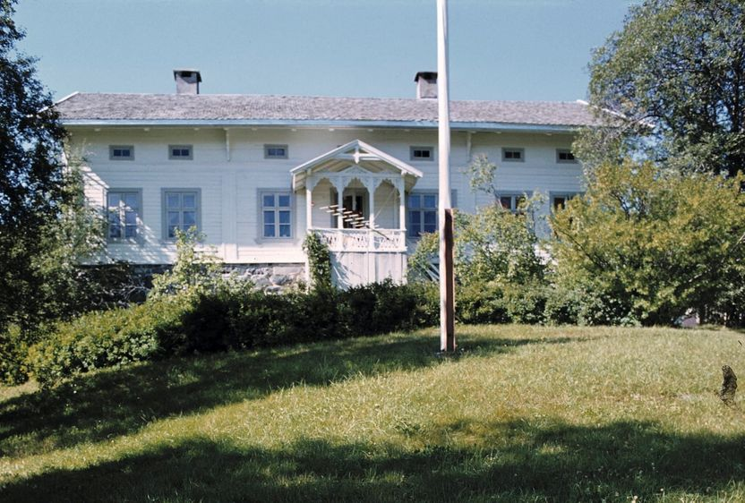 Hol prestegård. Foto: Ina Backer. Fra Riksantikvarens Kulturminnesøk.